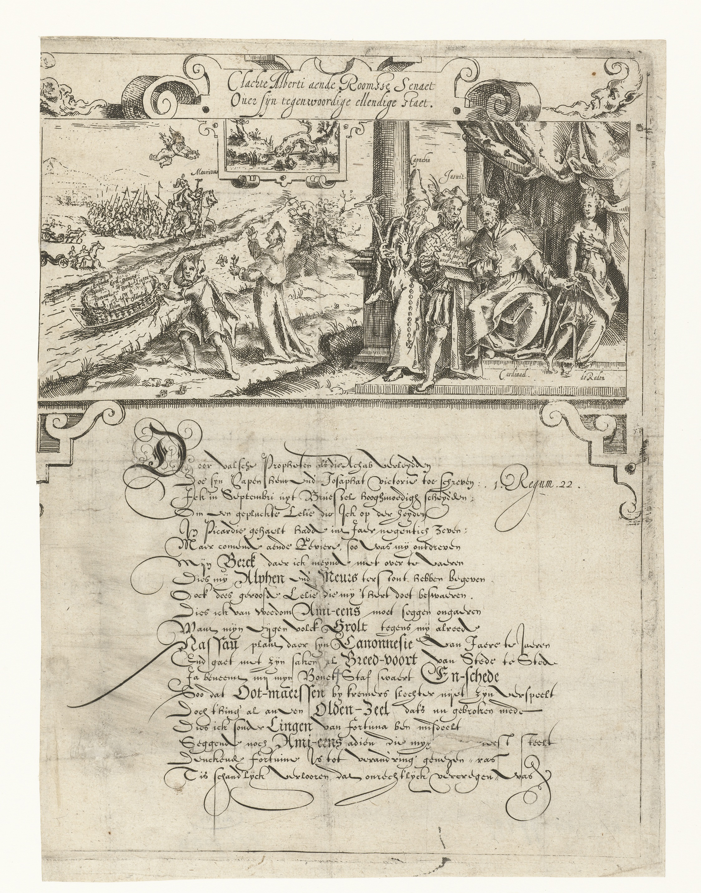 Spotprent op de verliezen van de Spanjaarden tijdens de veldtocht van Maurits in 1597. Rechts zit kardinaal Albrecht op een troon onder een baldakijn. Hij weert de Rede af en leent het oor aan een Jezuïet (met brief) die met een Capucijner monnik (met crucifix) aan zijn linkerzijde staat. Links in de rivier een schip met de namen Enschede, Grol, Bredevoort, Lingen, Rheinberg, Oldenzaal etc. voortgetrokken door prins Maurits die te paard zijn leger aanvoert. Middenboven tweeregelig vers: Clachte Alberti etc. Onder de voorstelling een gekalligrafeerd 20-regelig Hollands rederijkersvers waarin de overwinningen van Maurits worden bezongen.